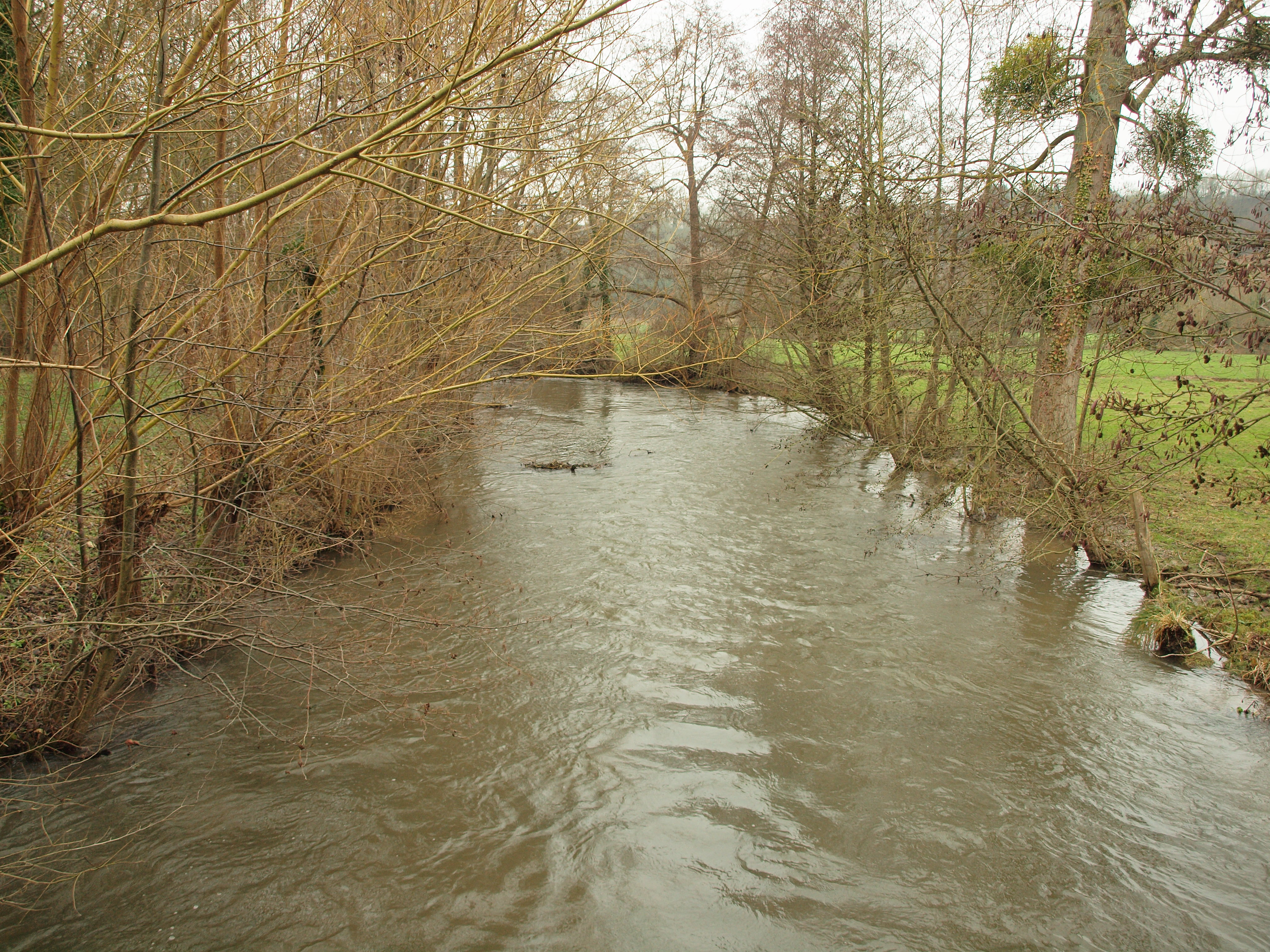 Troissereux (Oise, France)